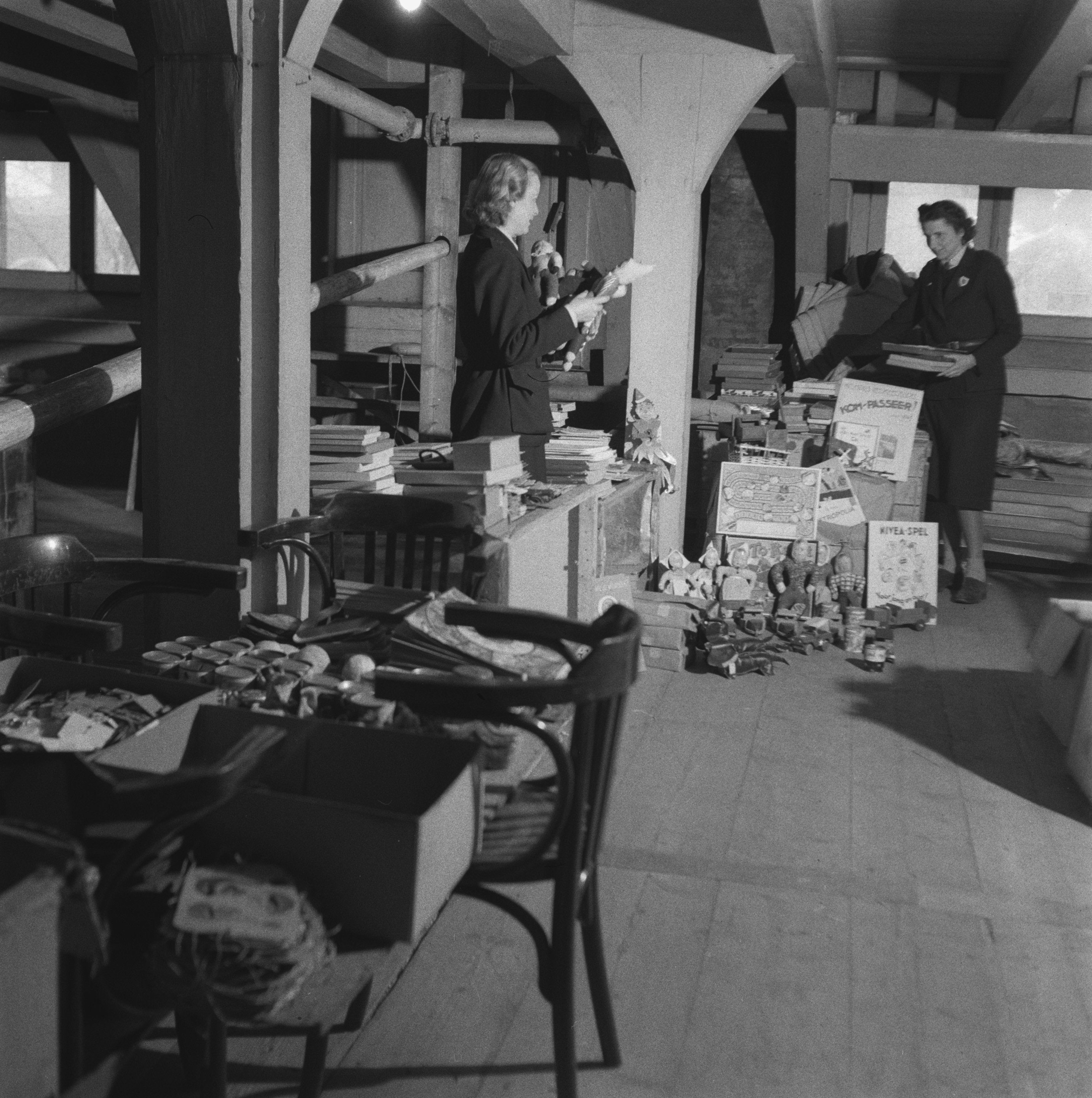 Collectie / Archief : Fotocollectie Anefo Reportage / Serie : [ onbekend ] Beschrijving : UVV [Unie van Vrijwilligers, red.] organiseert verzameling van speelgoed voor Sint Nicolaasfeest Datum : 21 november 1945 Trefwoorden : sinterklaas, speelgoed, verenigingingen Instellingsnaam : UVV Fotograaf : Breijer, Charles / Anefo Auteursrechthebbende : Nationaal Archief Materiaalsoort : Negatief (zwart/wit) Nummer archiefinventaris : bekijk toegang 2.24.01.03 Bestanddeelnummer : 901-1193